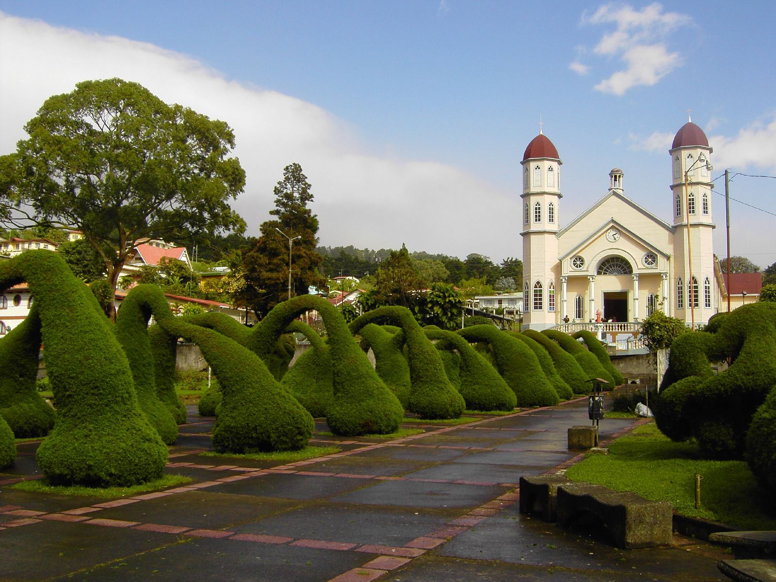 Vista de la Iglesia de San Rafael Arcángel y los topiarios del parque Evangelista Blanco Brenes, en Zarcero, Costa Rica.